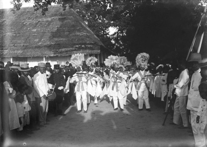 Repronegatief. Dansers op het feest van de controleur van Saparua, Molukken